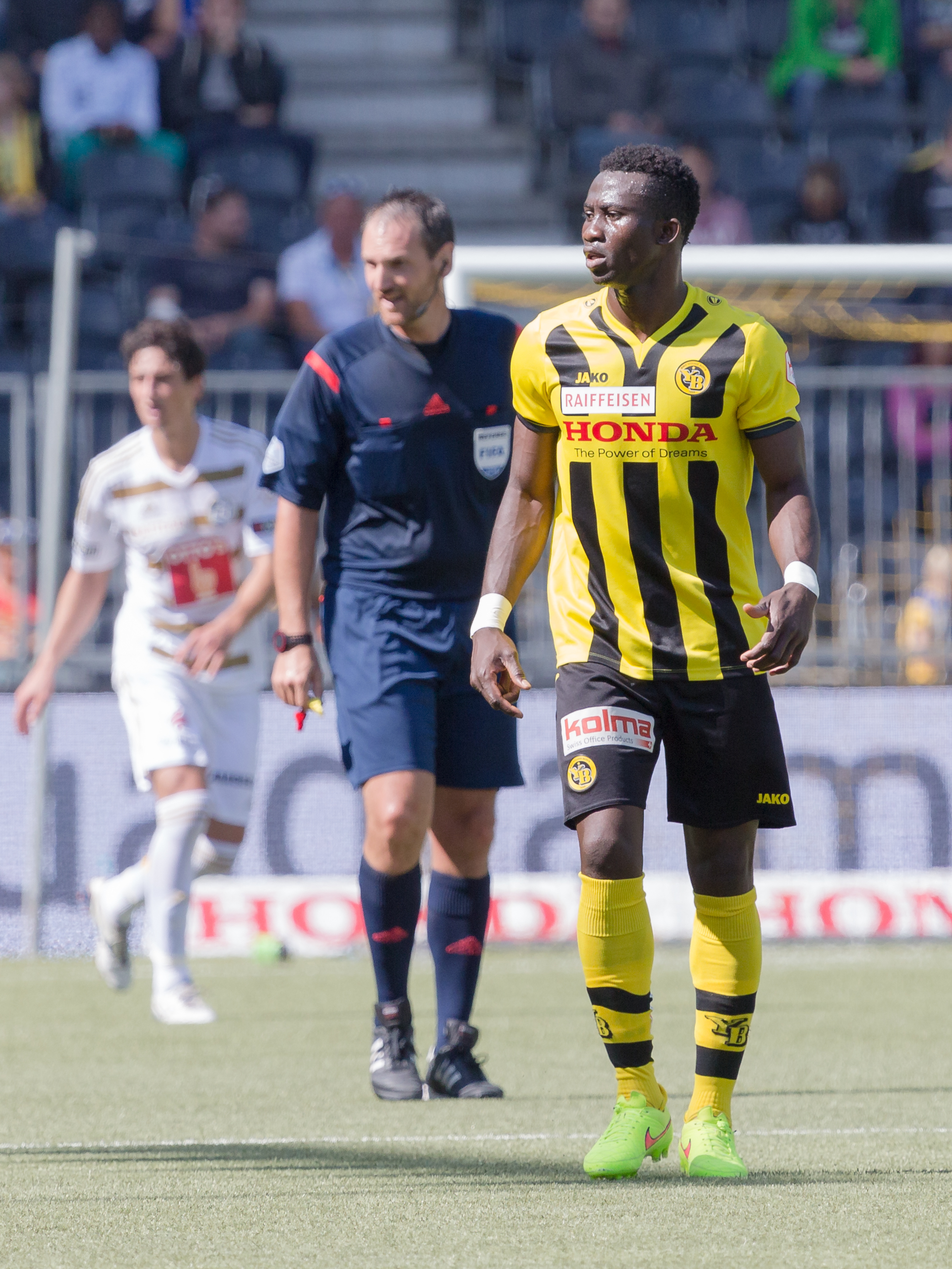 Sékou Sanogo beim Spiel des BSC Young Boys gegen den FC Luzern; im Hintergrund Schiedsrichter Nikolaj Hänni und Andrés Lamas